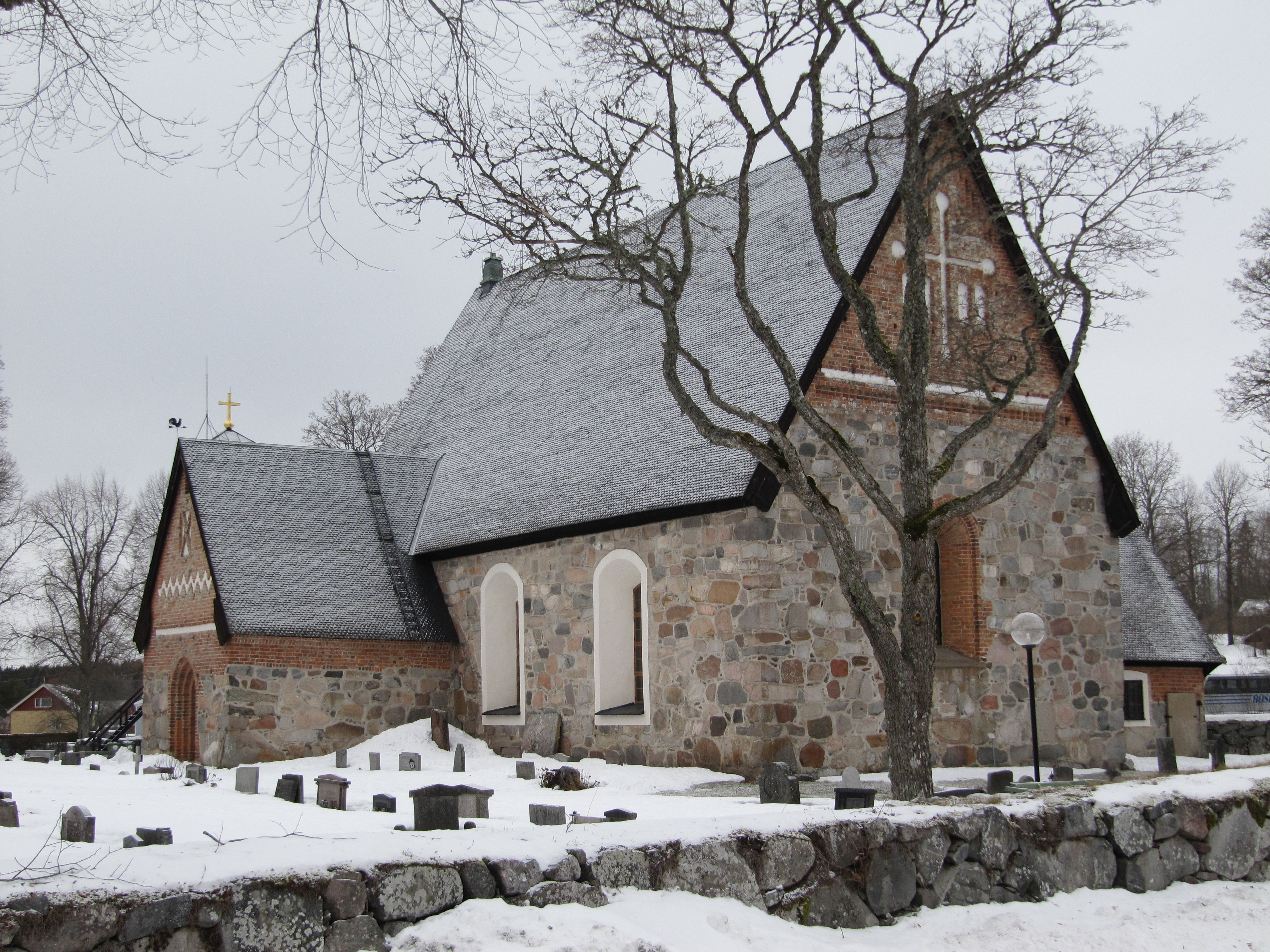 Rimbo kyrka